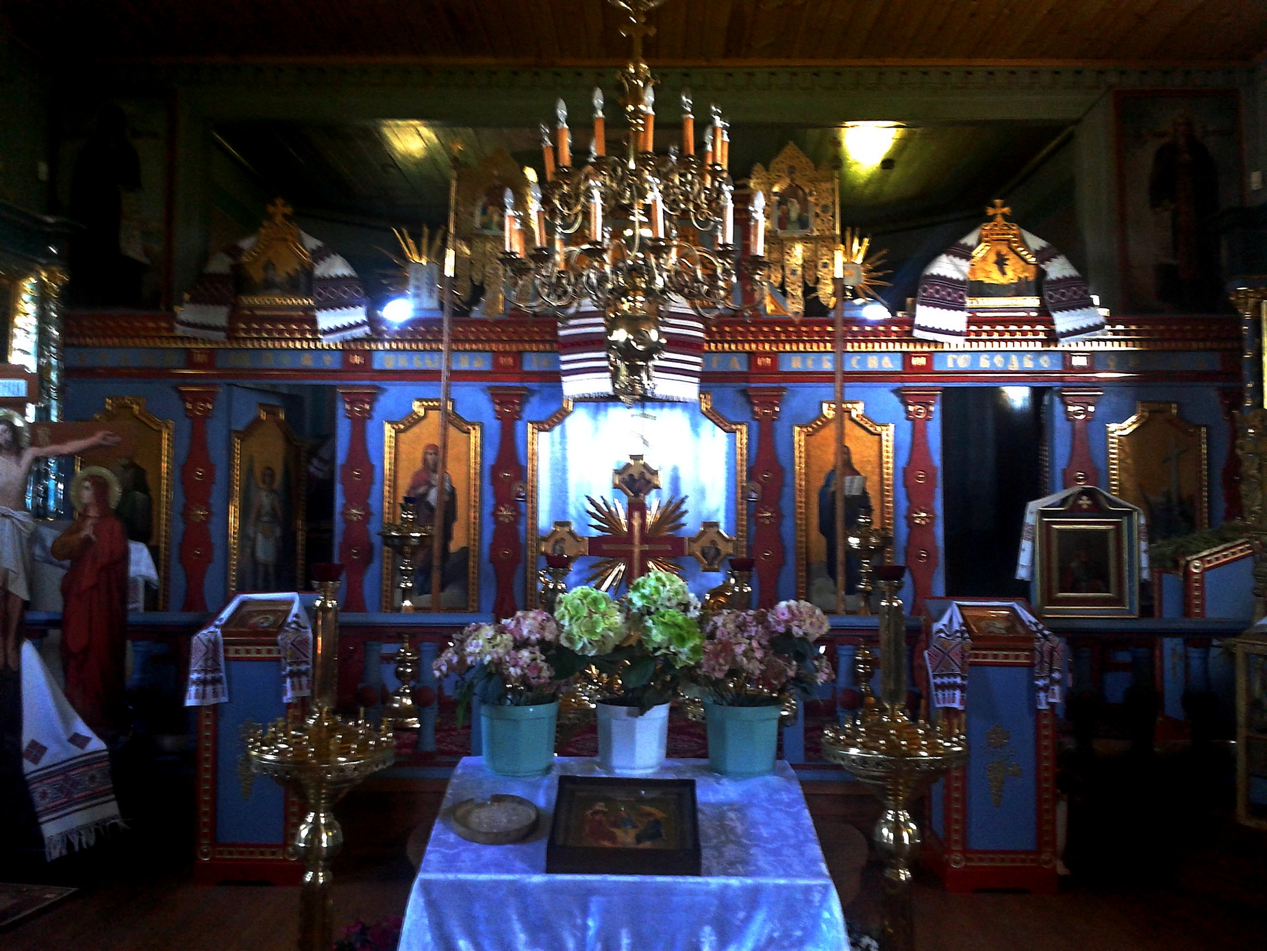 Wnętrze cerkwi w Horostycie